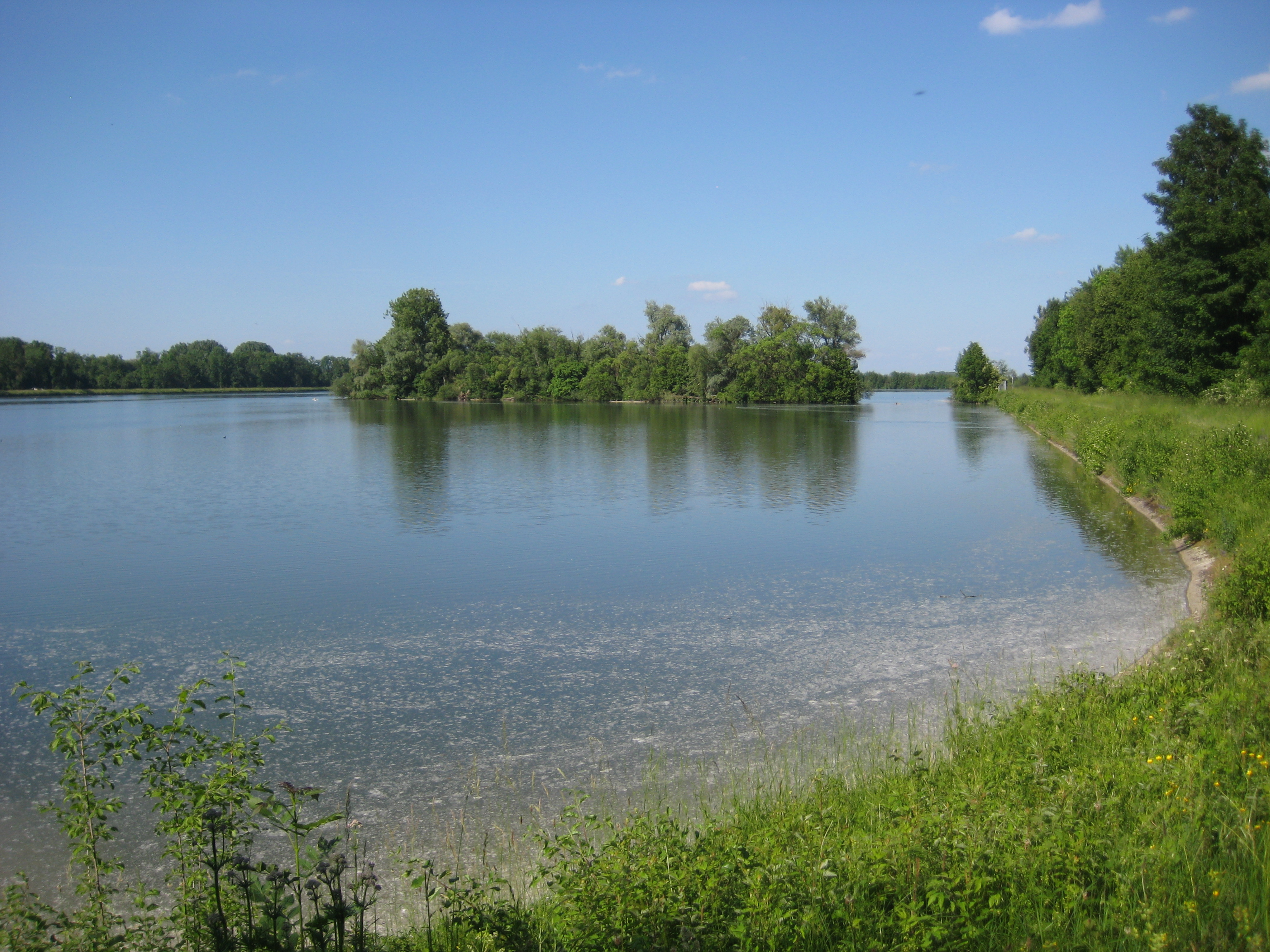 (LSG:BY-LSG-00521.01)_Schutz von Landschaftsteilen in den Unteren Isarauen am Altheimer Stausee